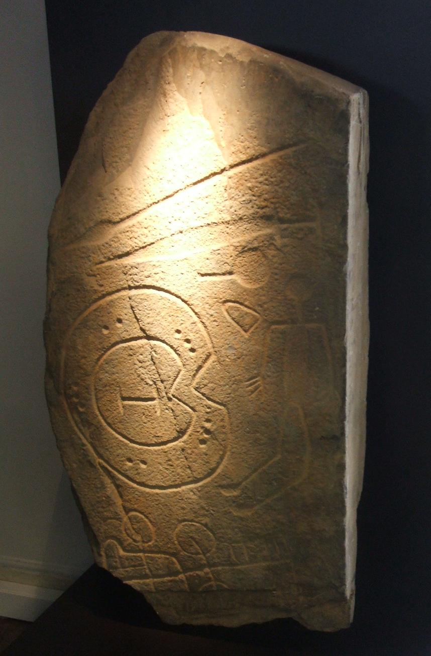 Estela de Solana de Cabañas (Cáceres)